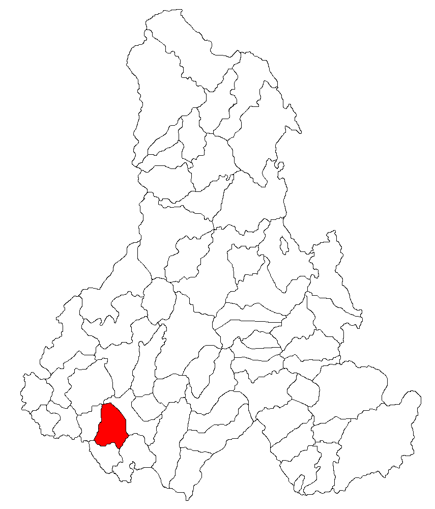 Categorie:Hărţi ale judeţului Harghita Contents 1 Licensing 2 Sursă 3 Licensing 4 Original upload log Licensing Sursă ro::Imagine:Harta_jud_Harghita.png